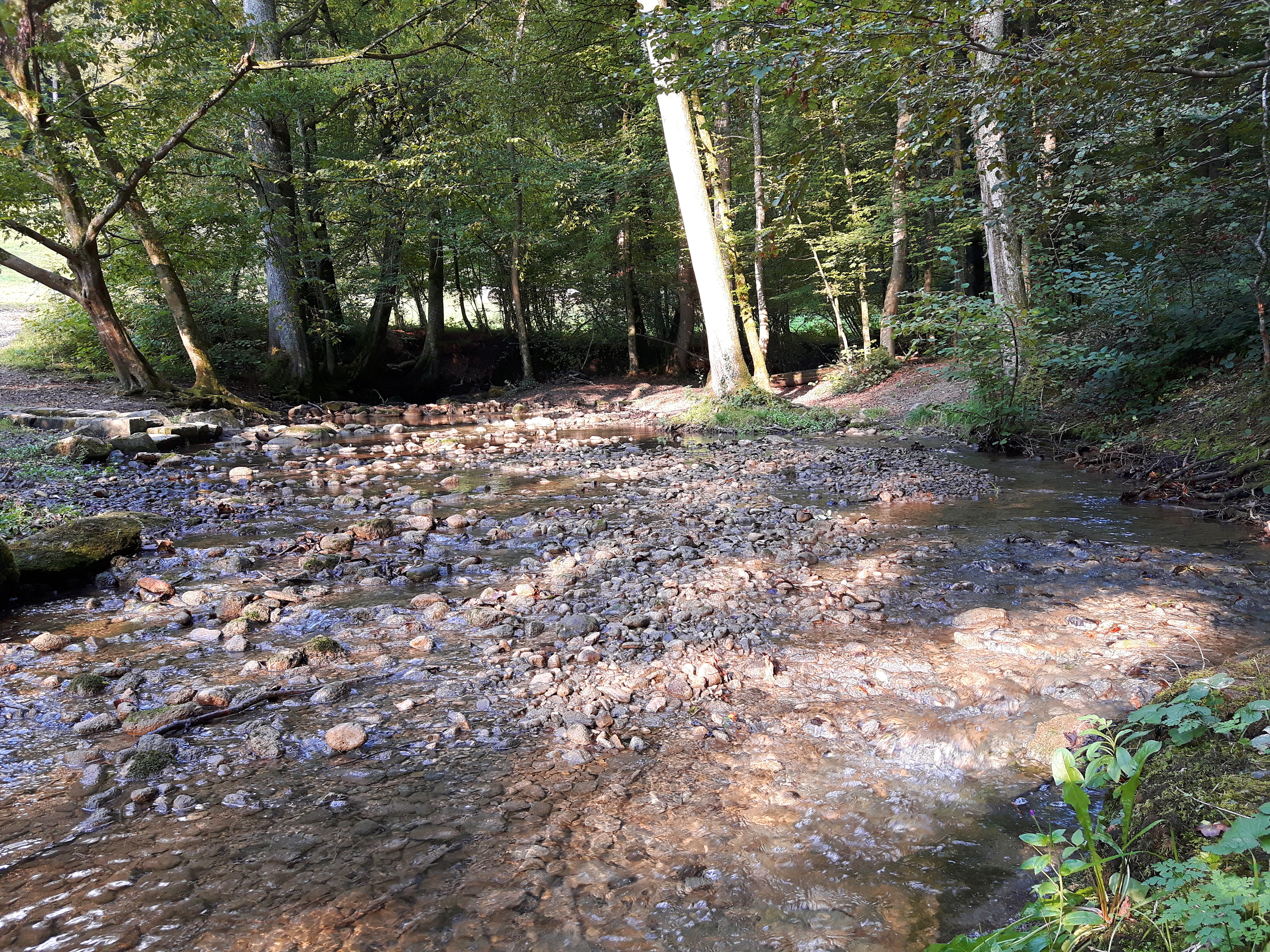 Der Wüeribach im Wüerital auf dem Gebiet der Gemeinde Birmensdorf, Kanton Zürich